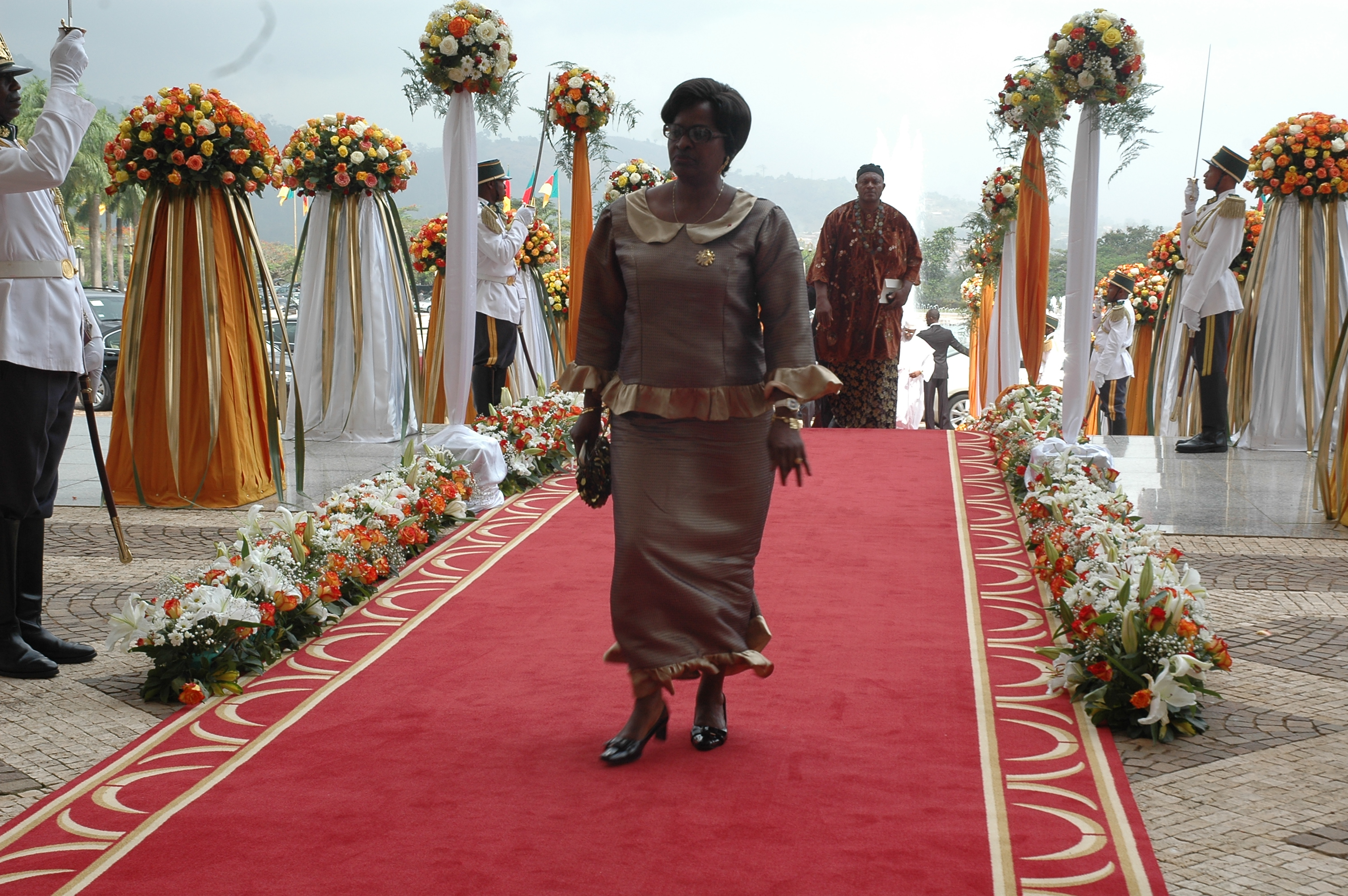 Mme Koung A Bessike à l'entrée du palais de l'unité lors de la cérémonie de présentation des voeux au Président Paul Biya